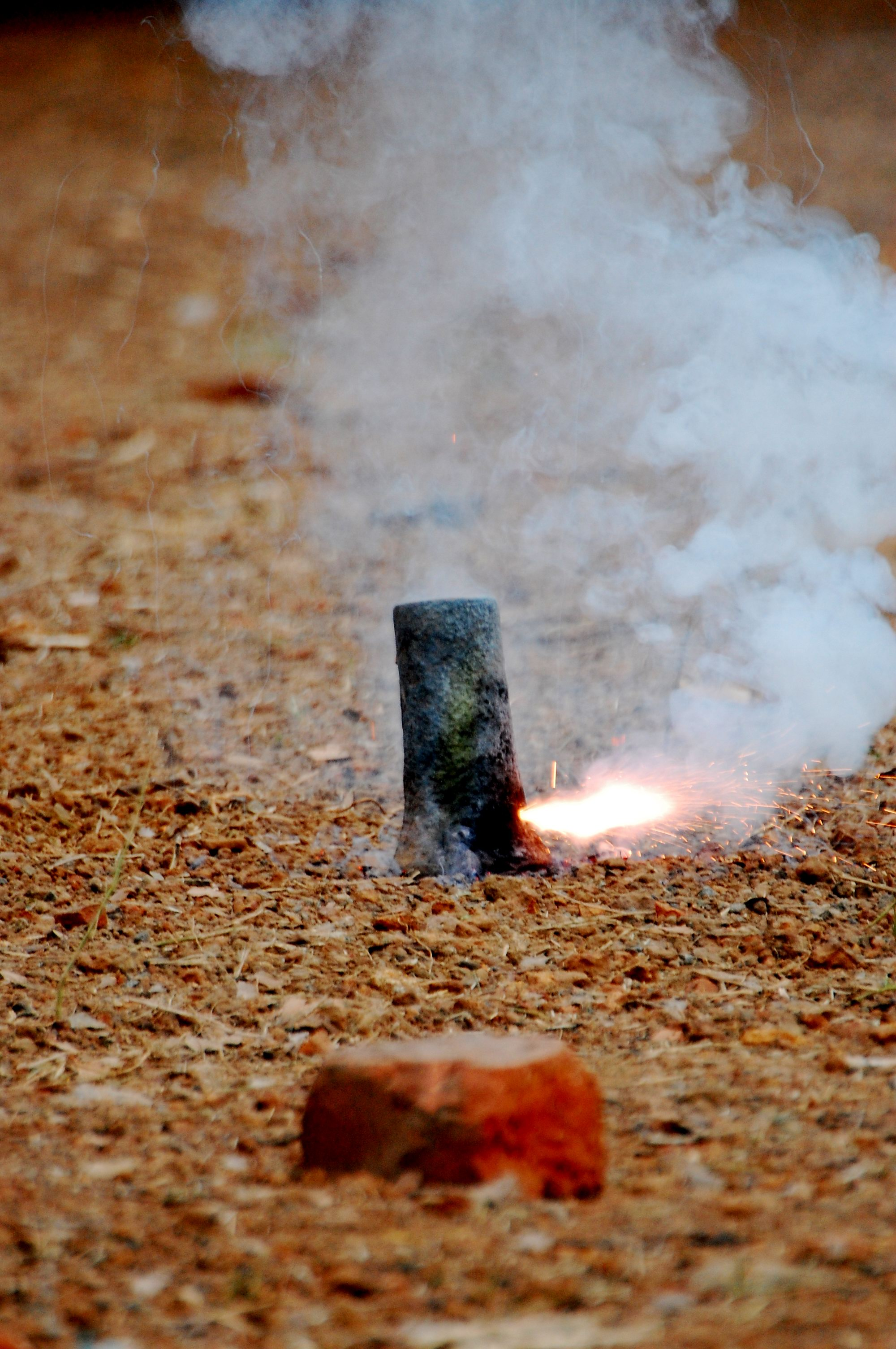 കതിനാ